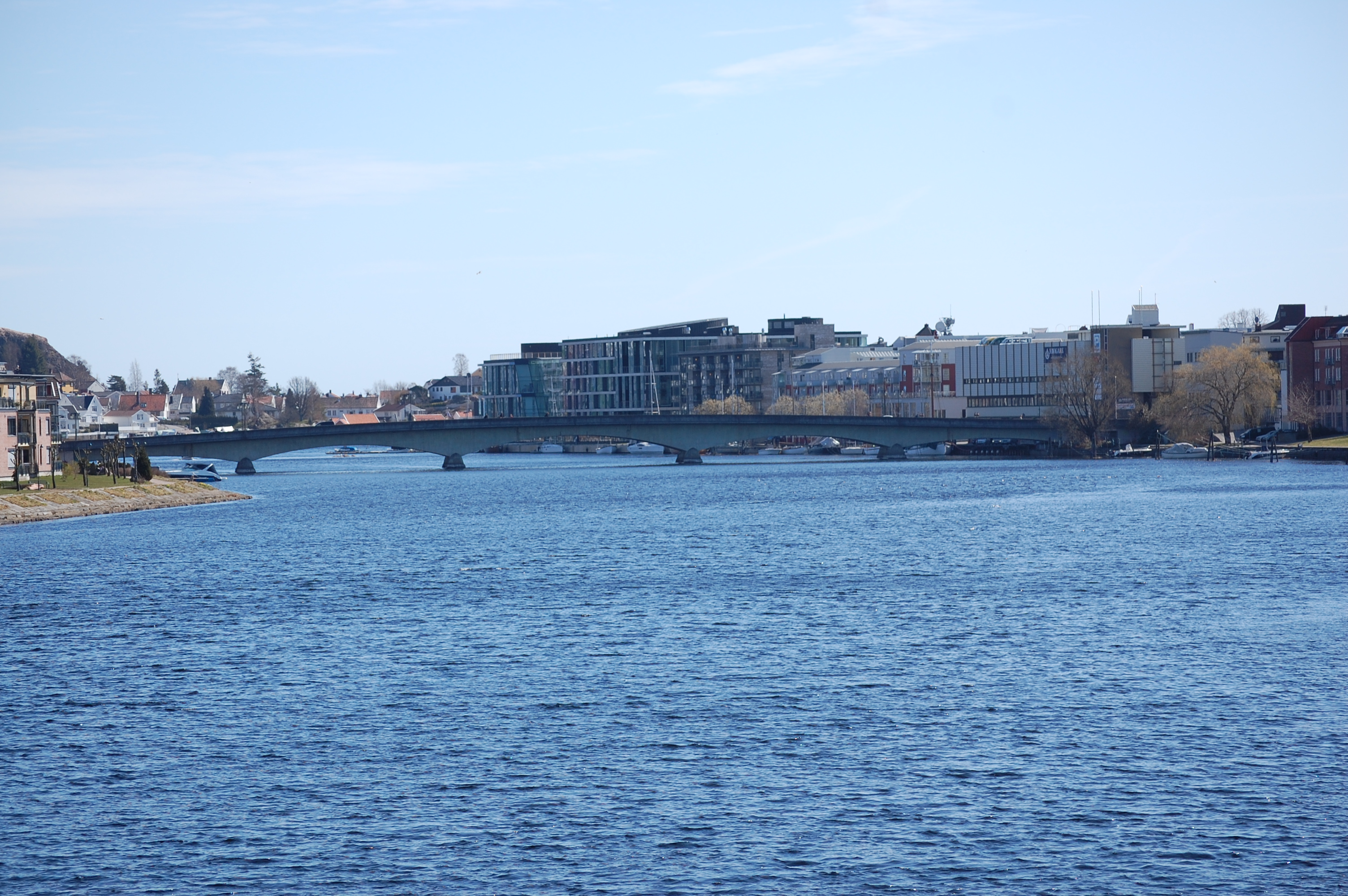 Lundsbroa, Kristiansand